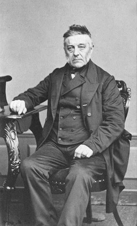 Jan Carel van Wessem (1799-1864), Eerste Kamerlid